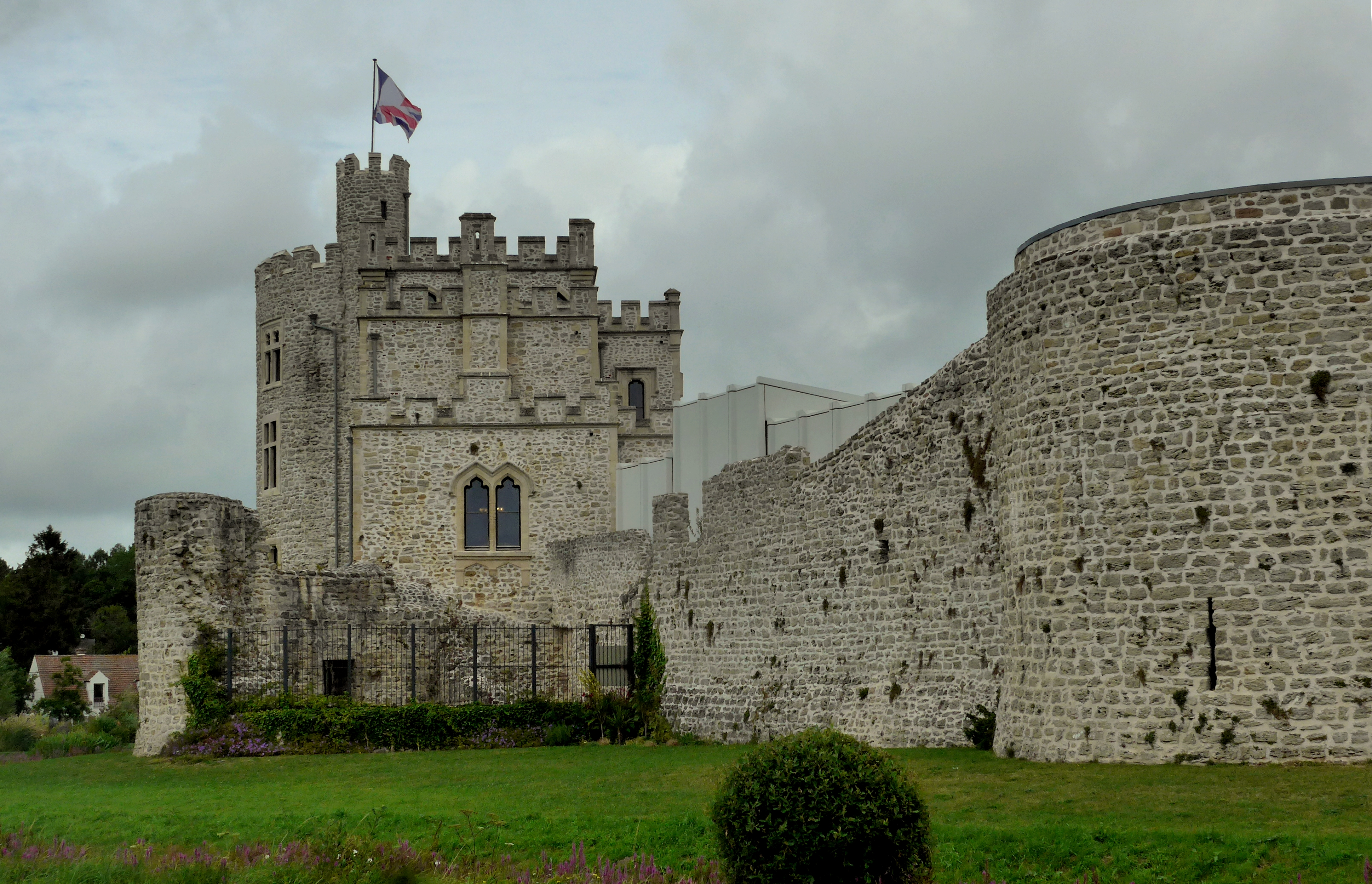 Château de Hardelot exterieur